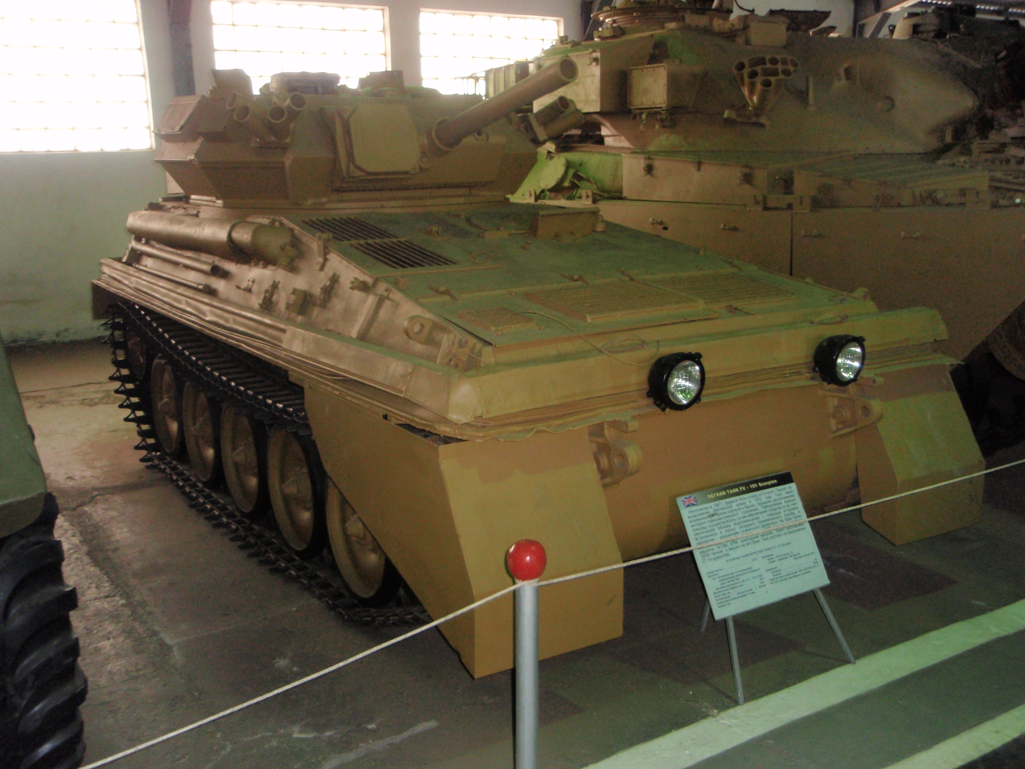 Британский лёгкий танк FV101 (Scorpion) в Кубинке